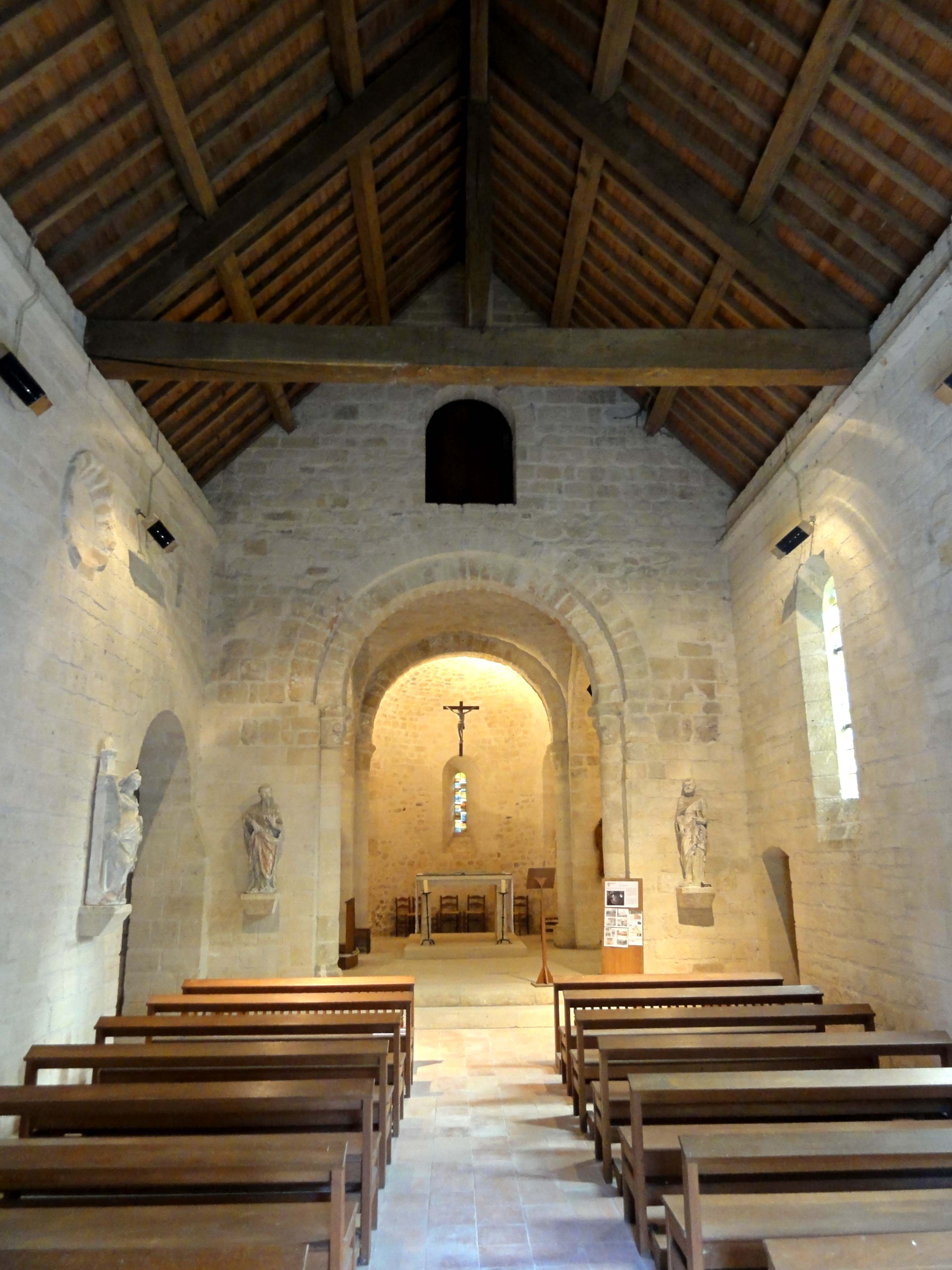 Intérieur de l'église - voir titre.